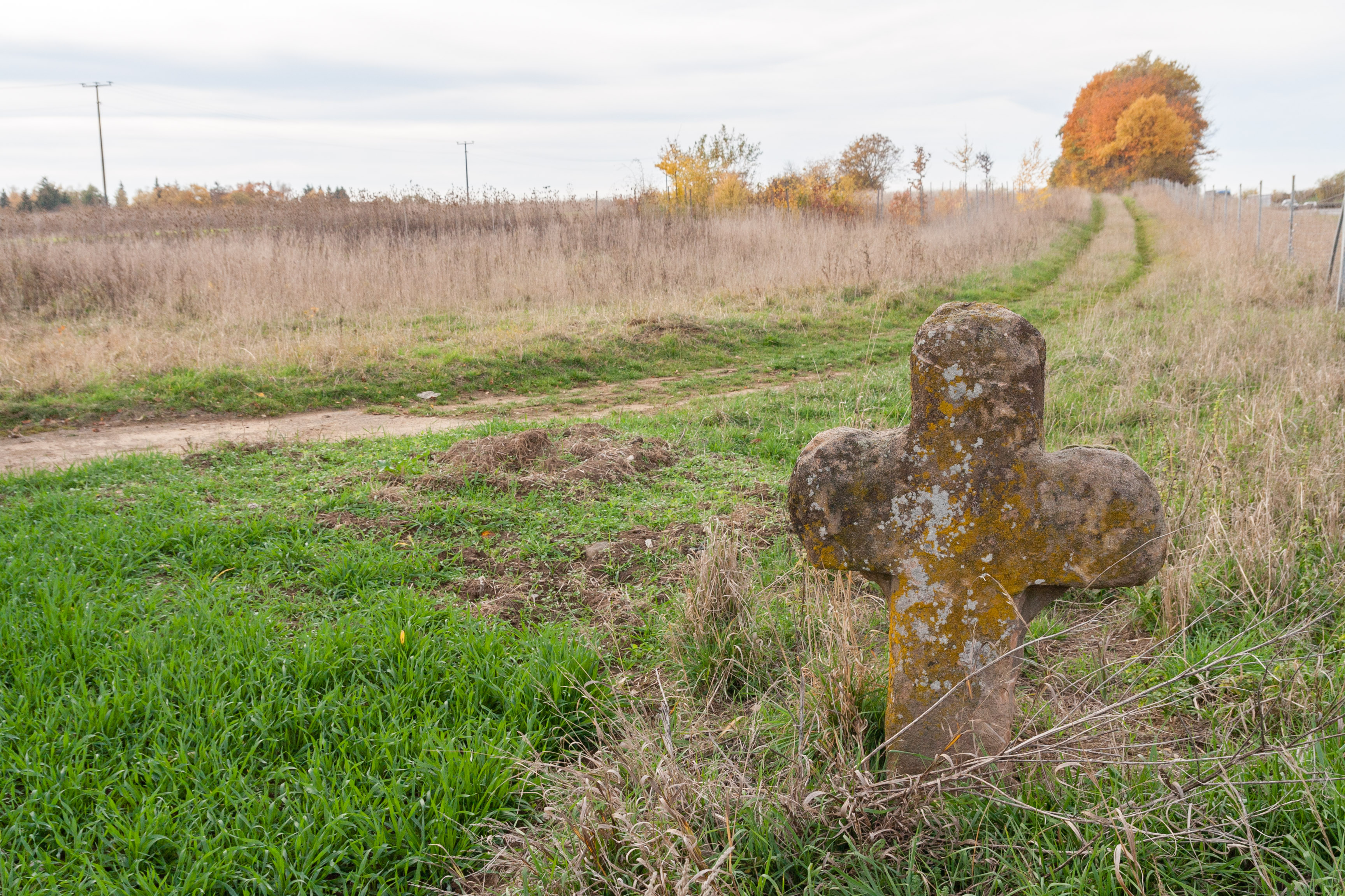 Steinkreuz, Sühnekreuz, Altdorf bei Nürnberg, Rasch, Sicht auf den Standort von Osten nach Westen